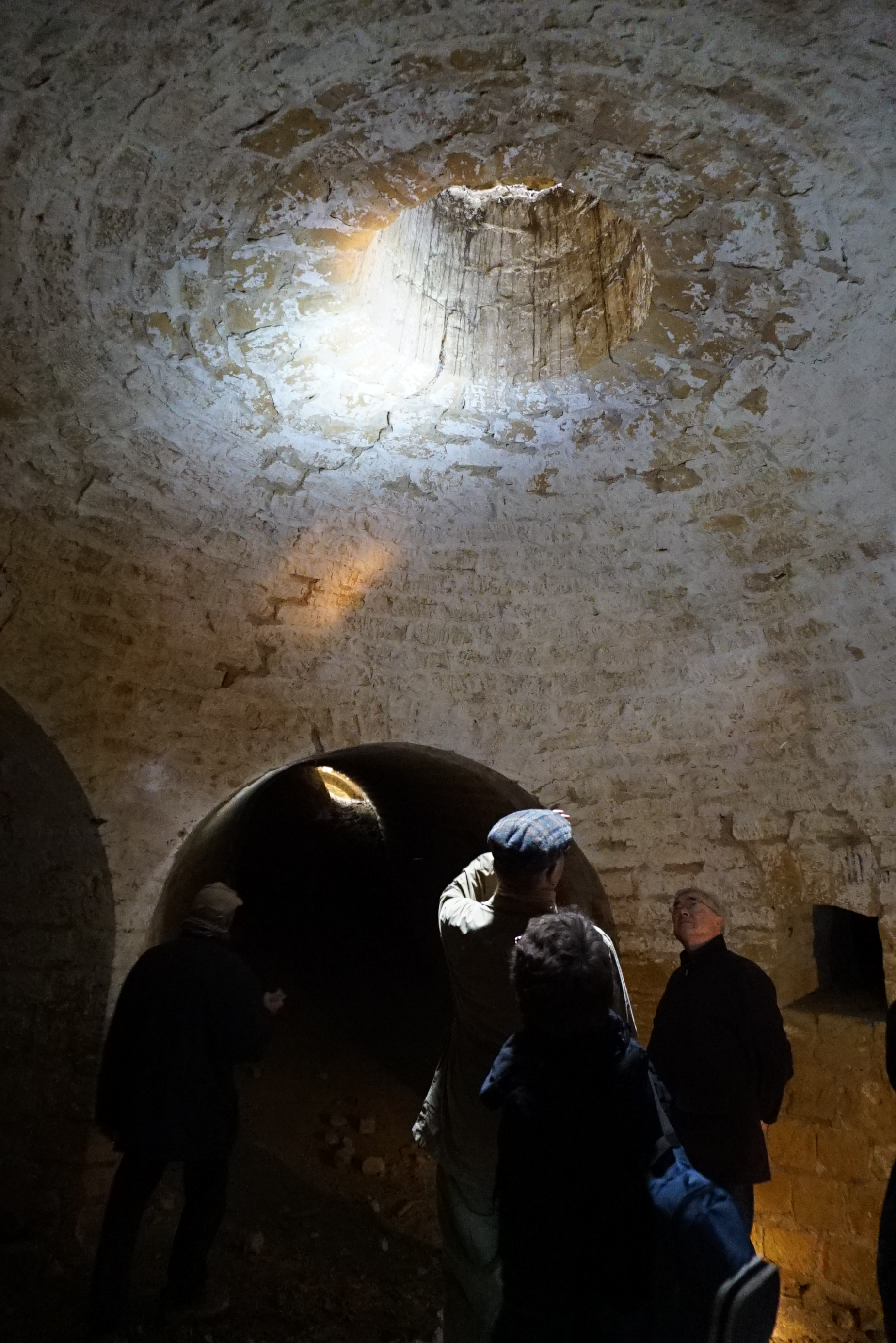 visite du fort de brimont.